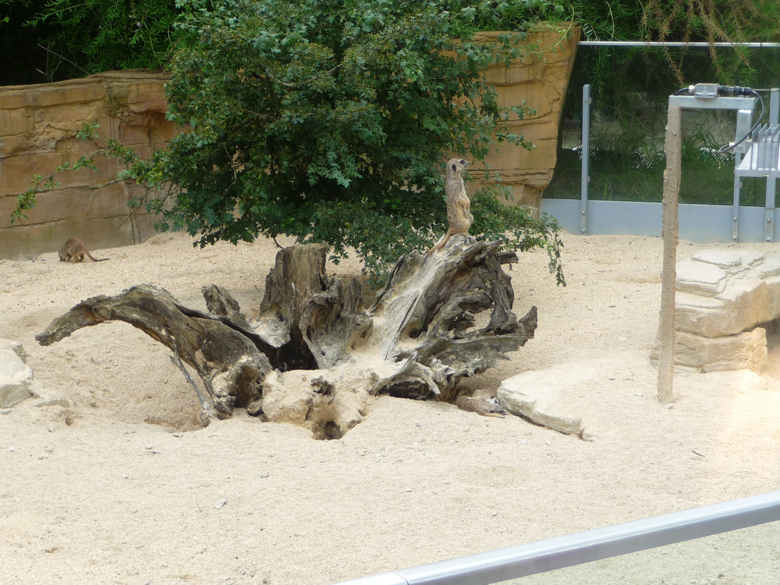 Neue Erdmännchenanlage in der Wilhelma